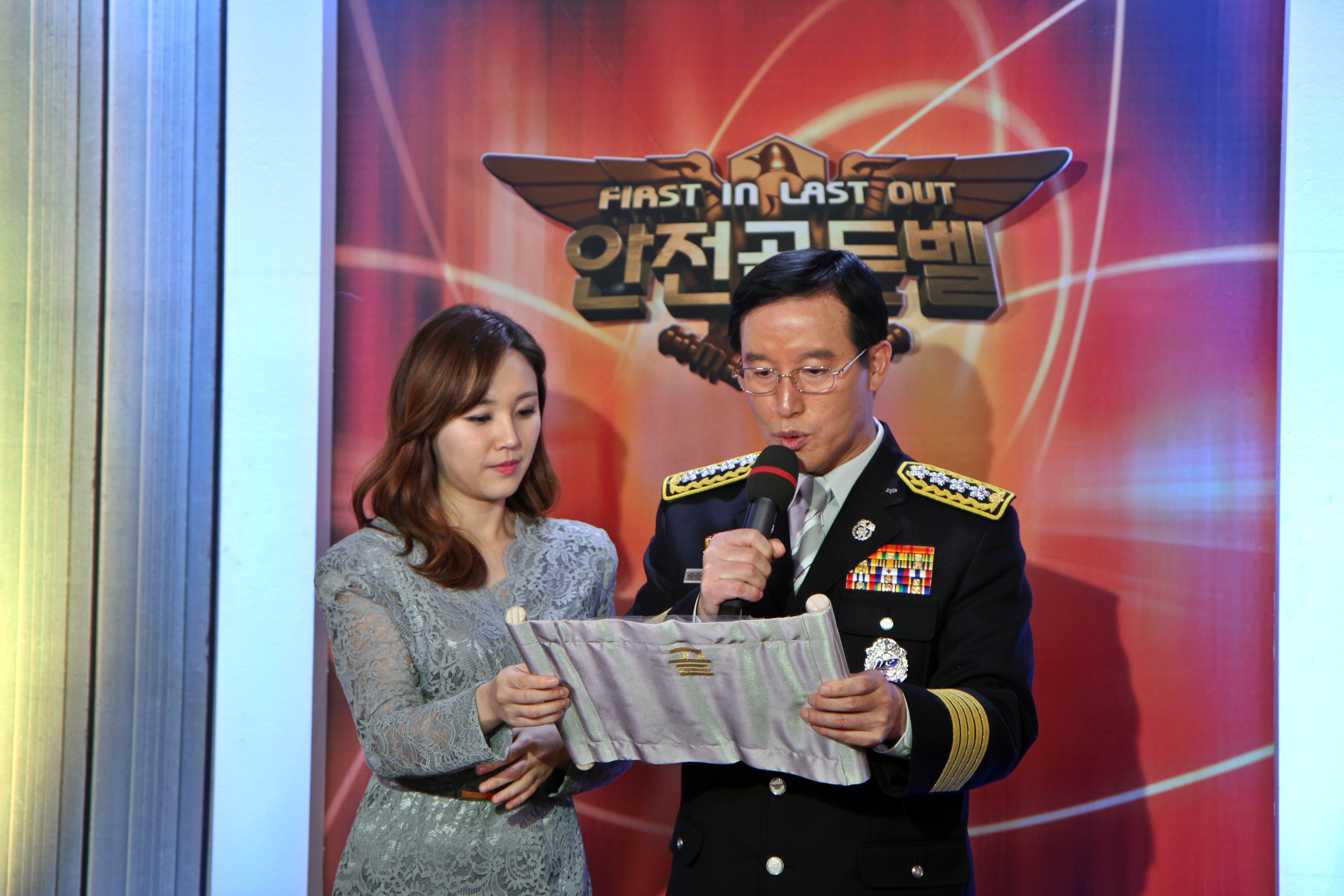 20150130도전!안전골든벨 한국방송공사 KBS 1TV 소방관 특집방송